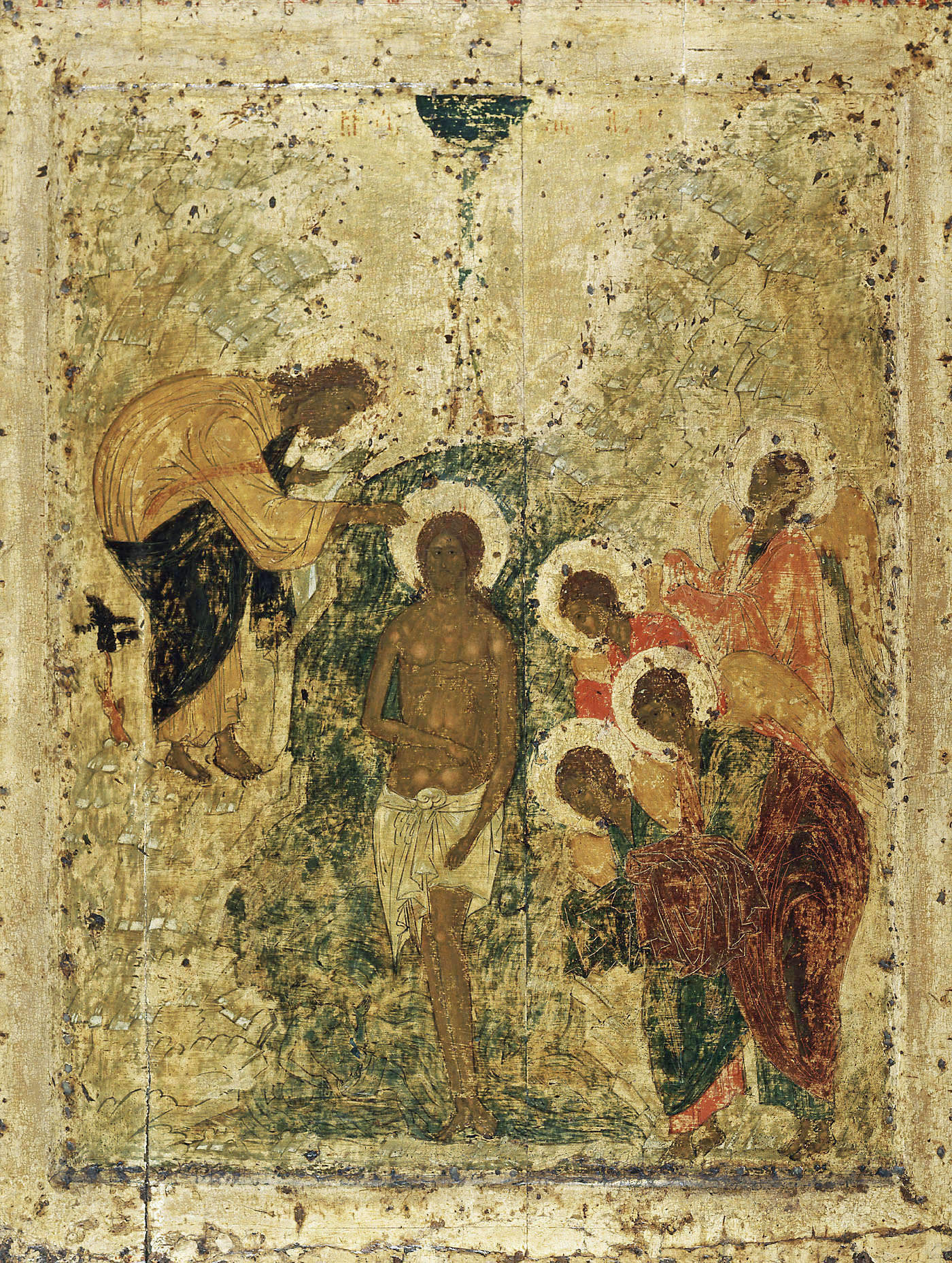 Икона из праздничного чина иконостаса Благовещенского собора Московского Кремля. Начало XV в. (1410-е гг.?). Попов 2007/1: 10–20-е годы XV в.